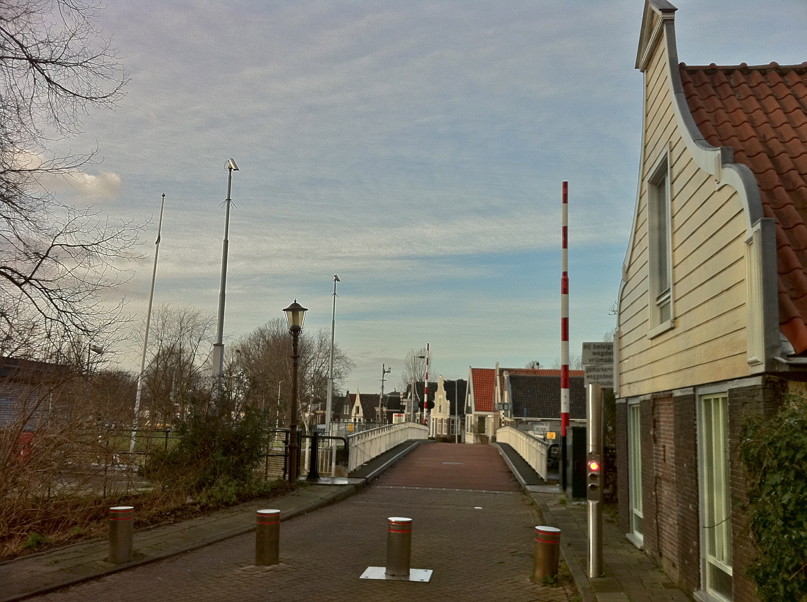 De Buiksloterdraaibrug (2205) in de Buiksloterdijk, over het Noordhollandskanaal in Amsterdam-Noord.